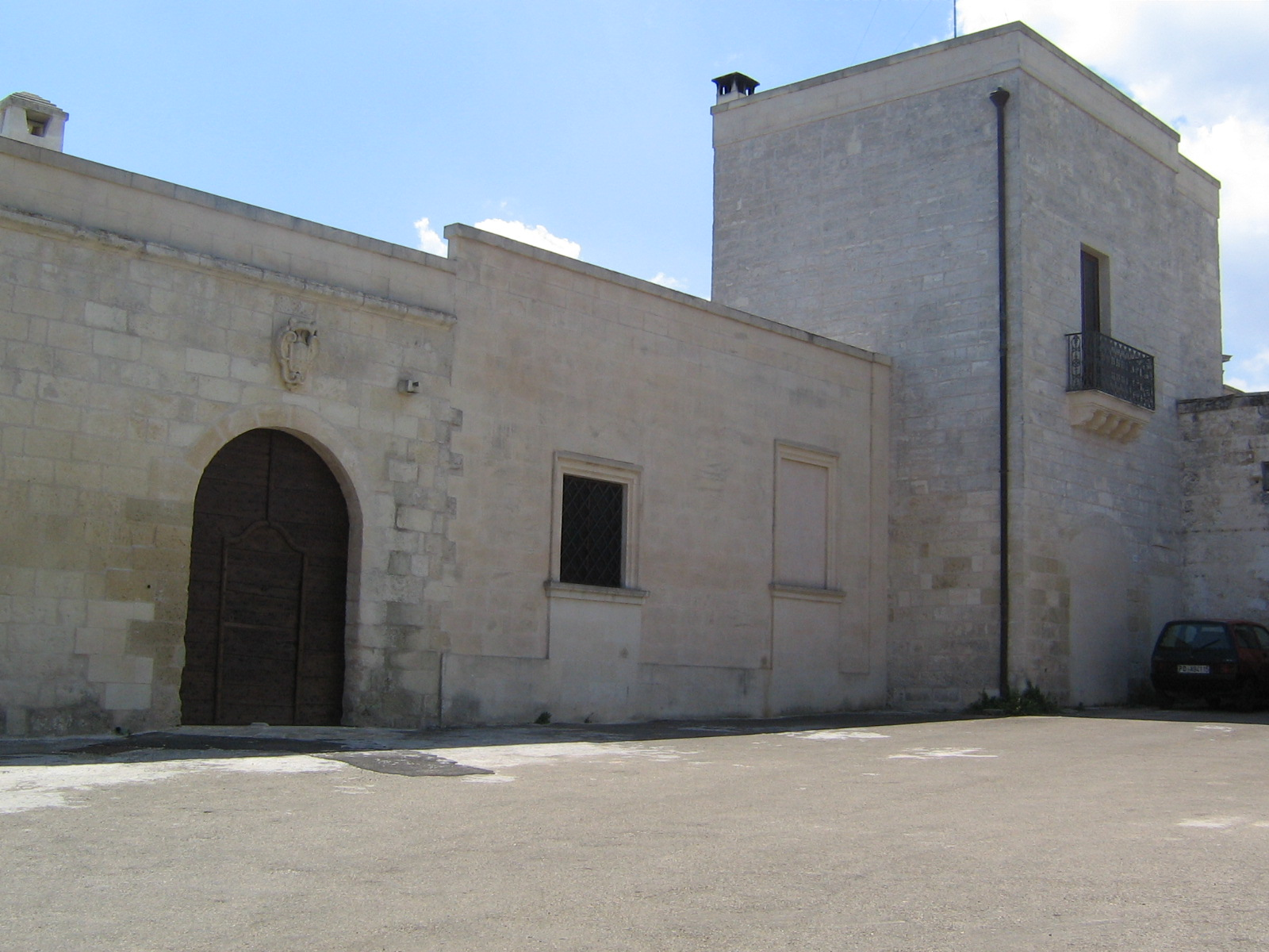 Complesso masserizio di fine Cinquecento, Cocumola, Minervino di Lecce, Lecce, Italia